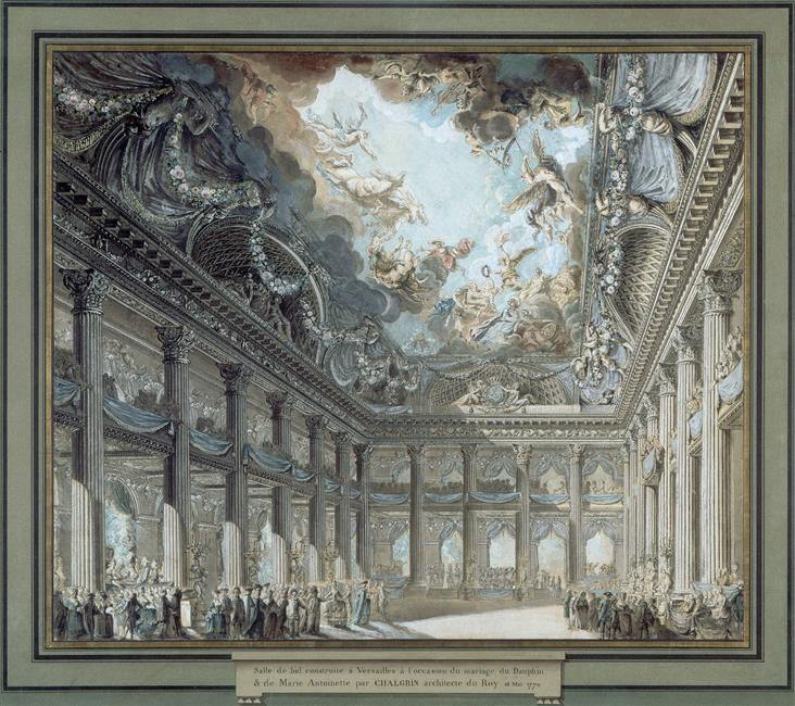 titre dans un cartouche : "Salle de bal construite à Versailles (sic) à l'occasion du mariage du Dauphin et de Marie-Antoinette par Chalgrin, architecte du Roy (sic) en mai 1770". (Cette construction provisoire fut en réalité construite à Paris dans les jardins du Petit Luxembourg pour le comte de Mercy-Argenteau, ambassadeur d'Autriche.) encre noire, rehauts de gouache - 0.590 m x 0.690 m Paris, musée du Louvre - inv. RF31877